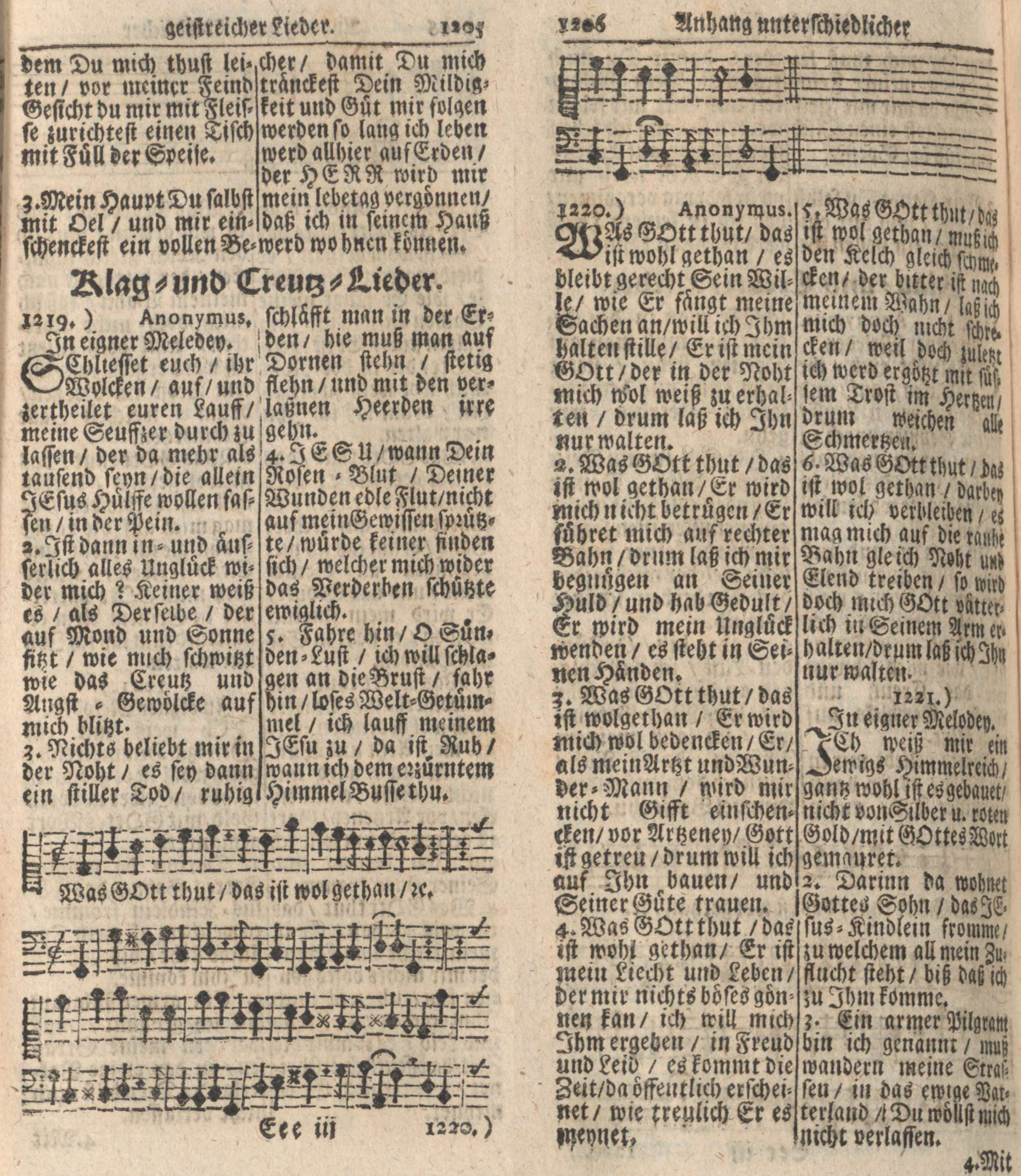 Hymn Was Gott ist, das ist wohlgetan by Samuel Rodigast in the 1690 Nuernbergische Gesangbuch of Konrad Feuerlein and Johann Saubert